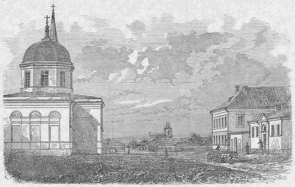 Беларуская (тарашкевіца): Лепель (Lepiel), пляц Рынак (plac Rynak). Царква і касьцёл